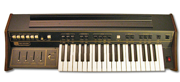 sintetizzatore ARP Pro-Soloist Licensing Categoria:Sintetizzatori Categoria:Sintetizzatori ARP